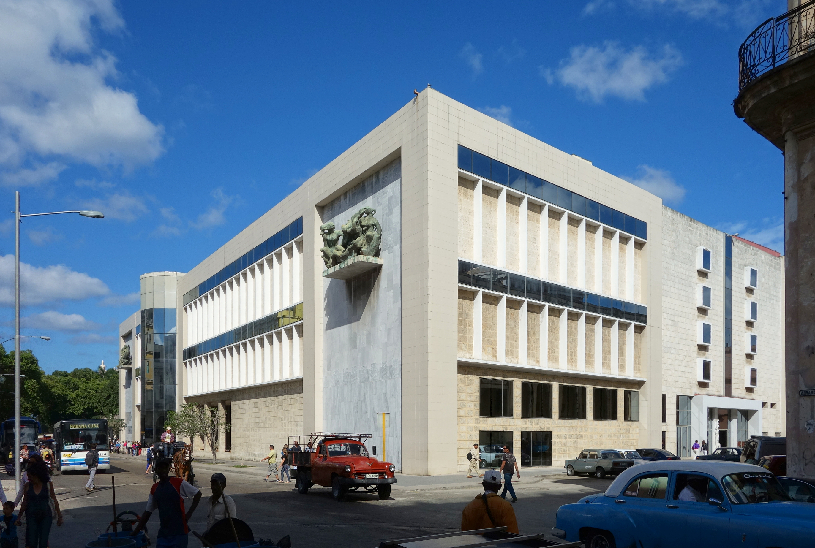 Museo Nacional de Bellas Artes de La Havane (bâtiment de l'art cubain).